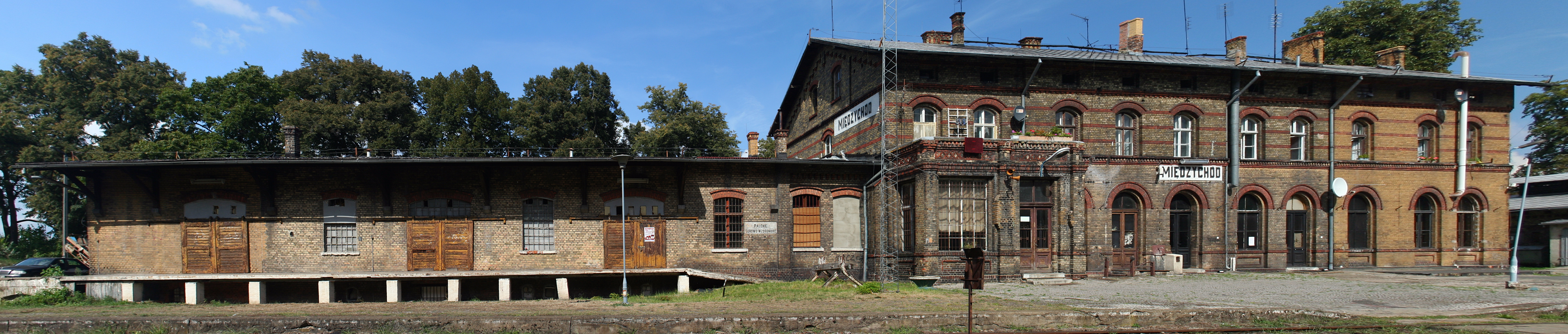 Międzychód. Zespół stacji kolejowej, 1888-1910.